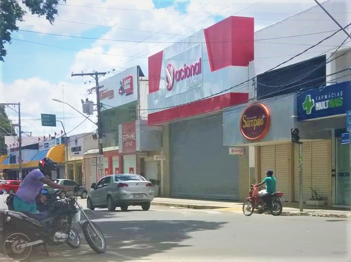 Praça Senador Temístocles - Cruz das Almas